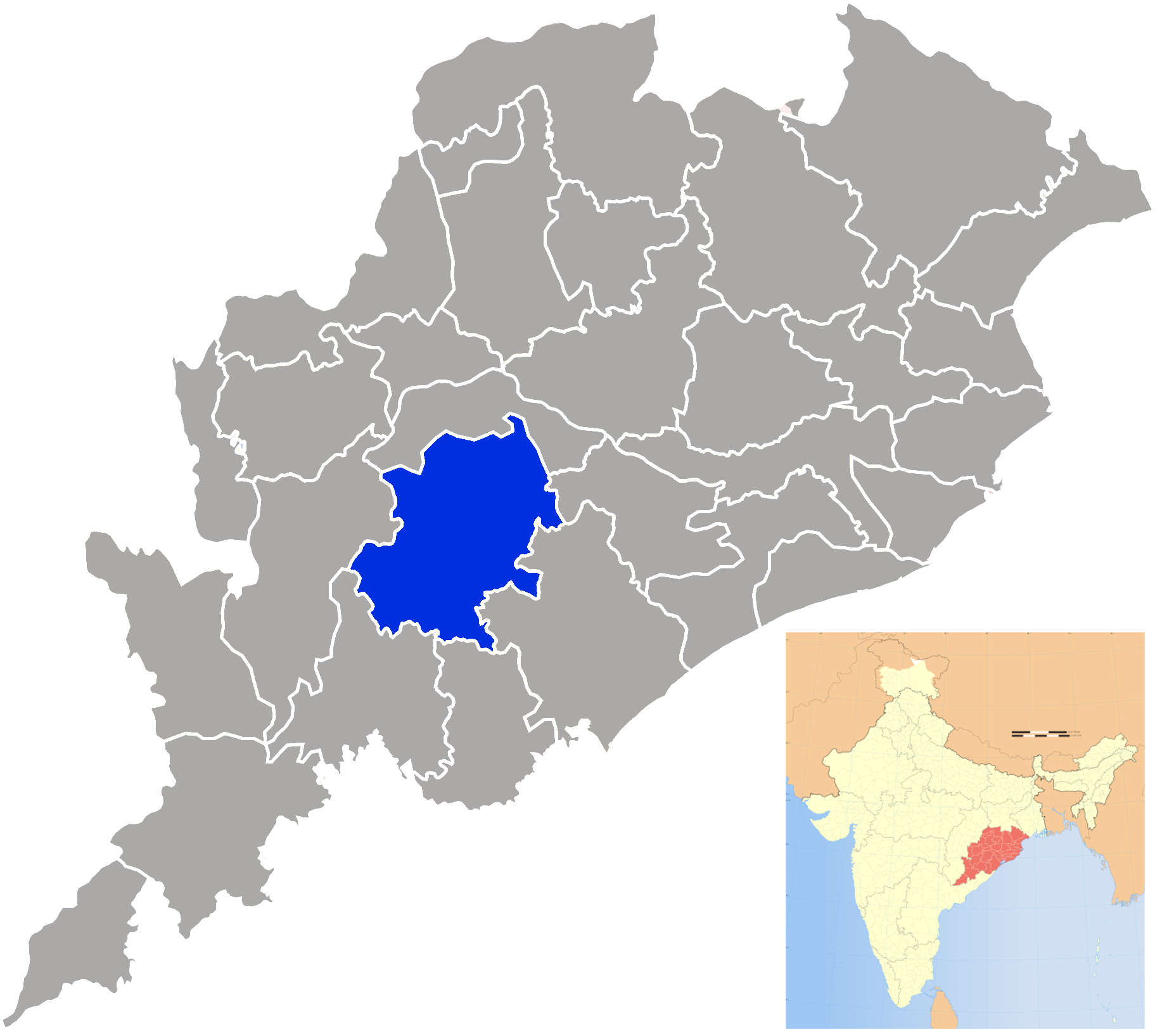 Distrito de Kandhamal en Orissa